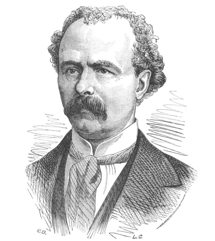 "M. Lanfrey, sénateur inamovible décédé à Pau (d'après photographie Truchelut)".